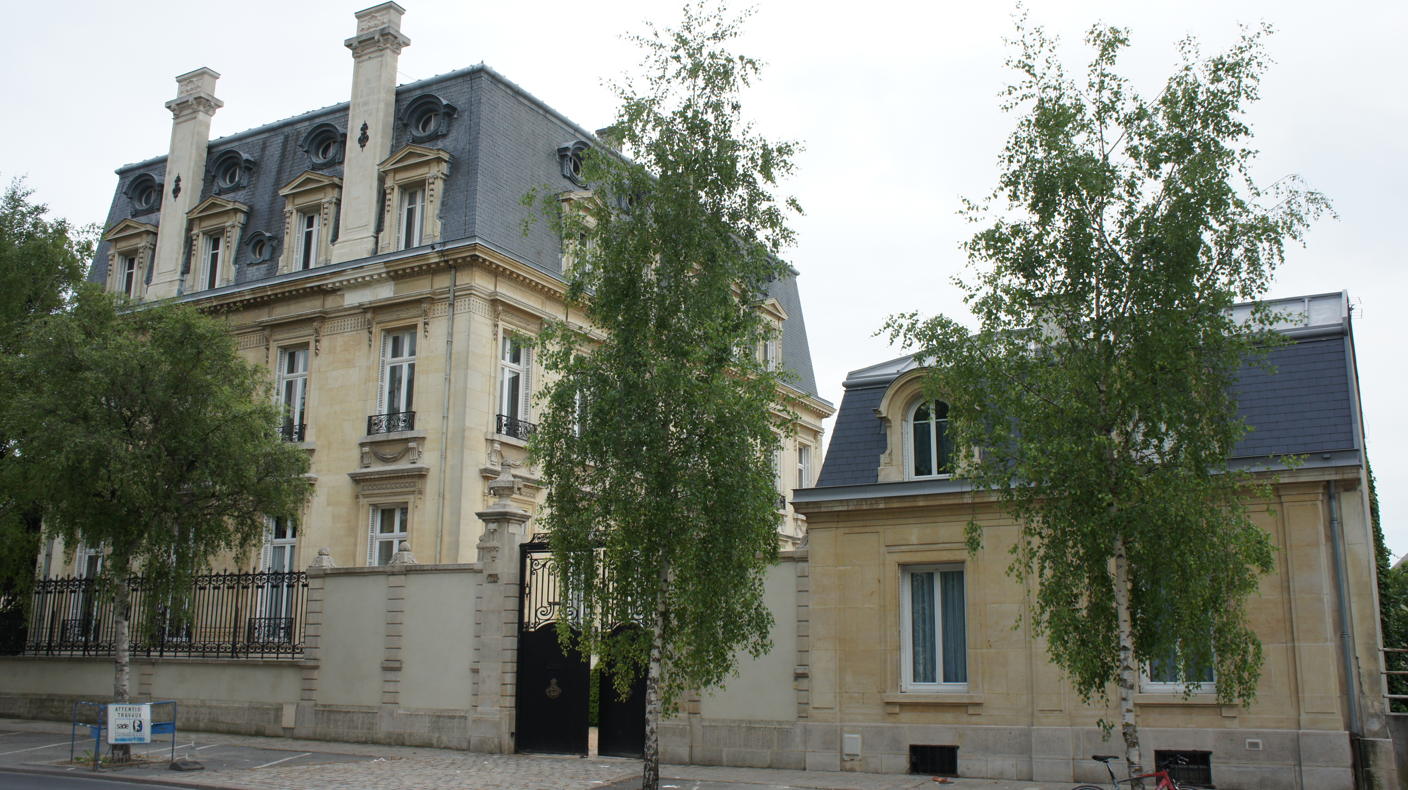 vue de l'hôtel particulier Werlé .